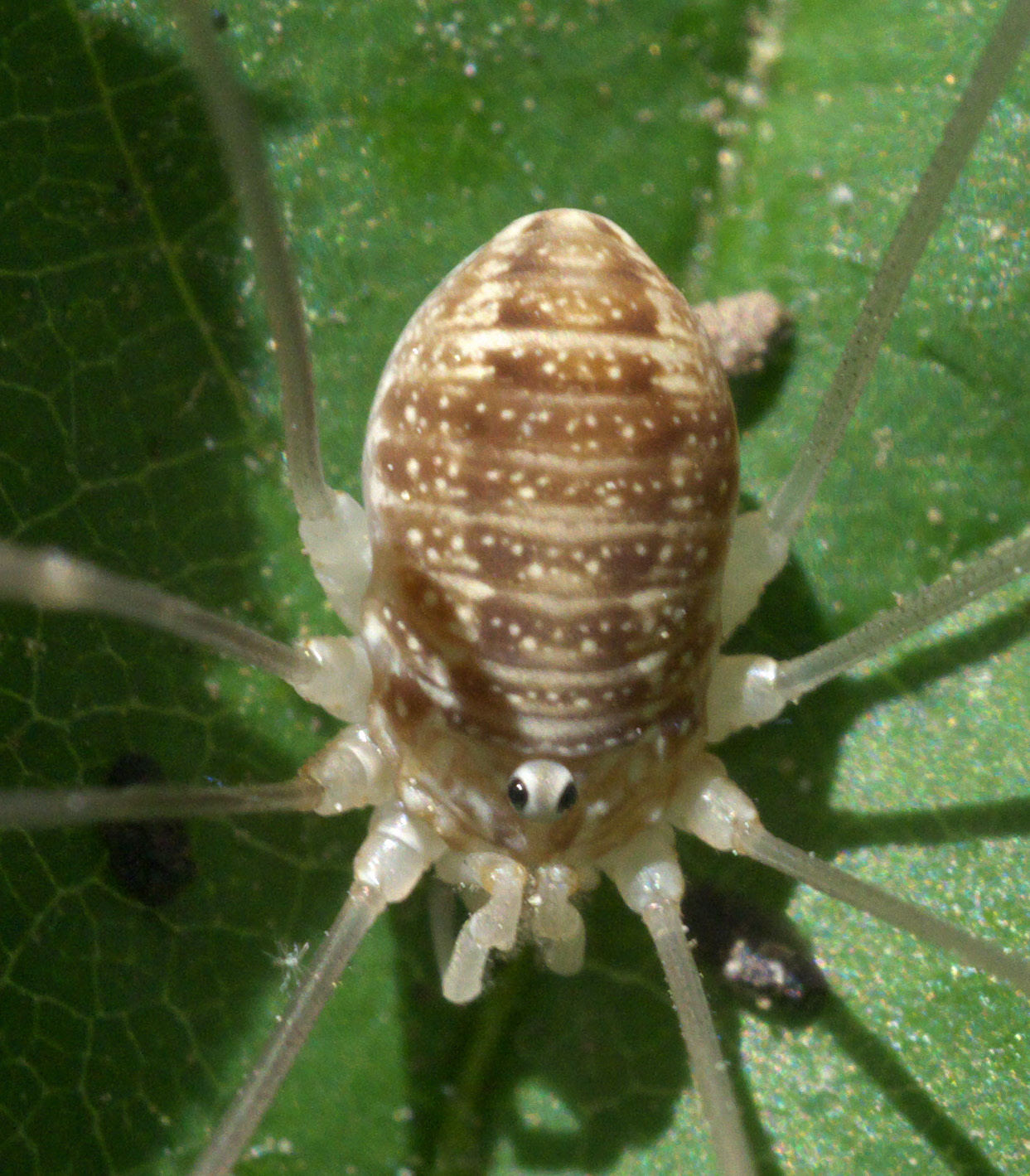 Leiobunum vittatum, Order: Harvestmen, ID Confidence: 75